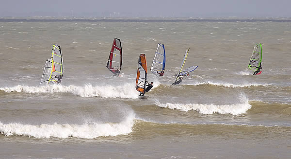 Spot de Rivedoux-Plage - Île de Ré - Charente-Maritime Photo issue de ma banque d'images : Pep.per 15 octobre 2006 à 21:09 (CEST)